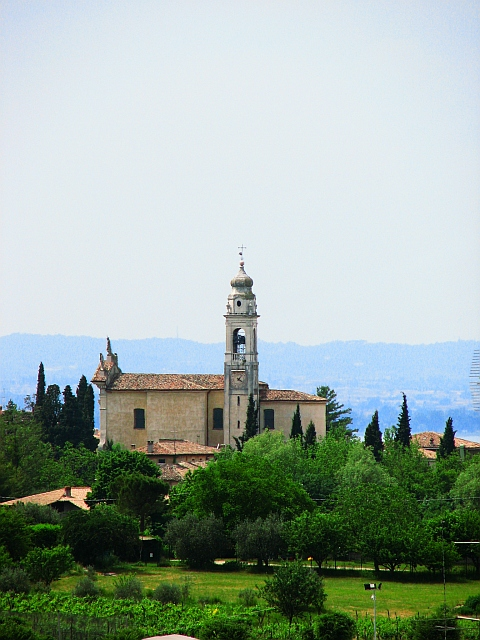 Pacengo, frazione di Lazise sul Lago di Garda, la chiesa parrocchiale.